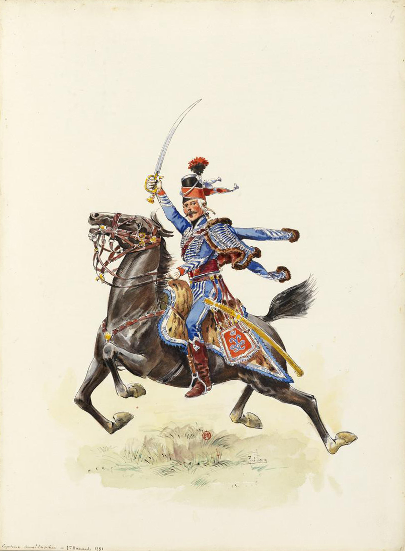 Capitaine commandant le 4e escadron au 1er Hussard en 1791